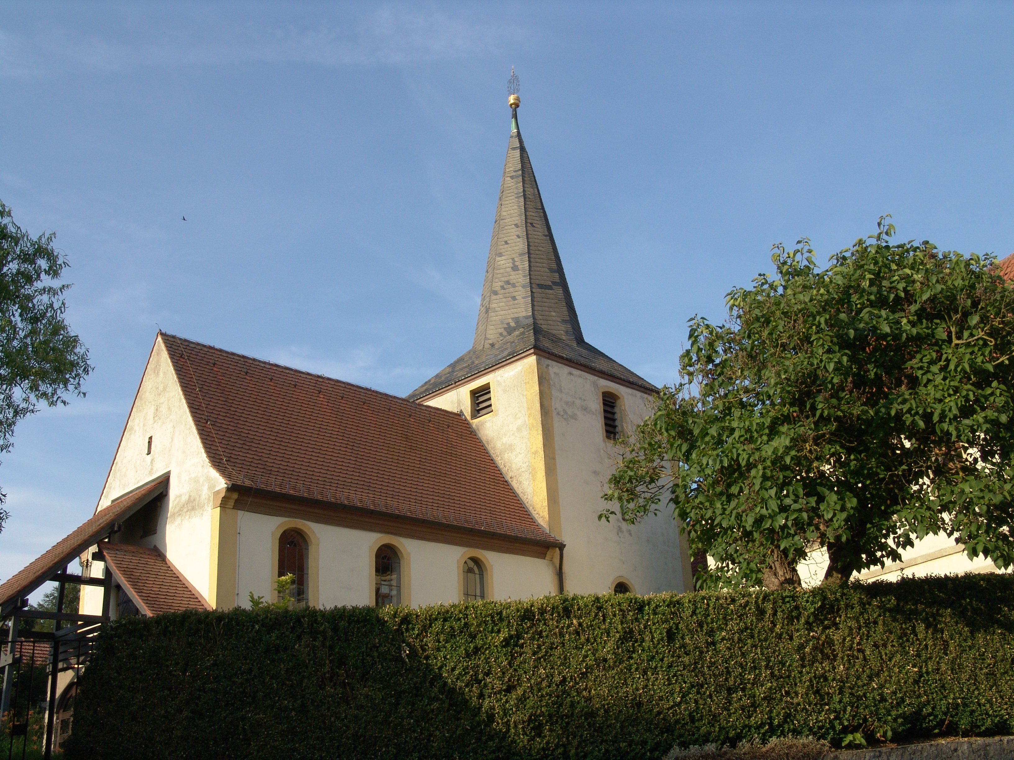 Evangelische Kirche in Lindflur, Kr. Würzburg